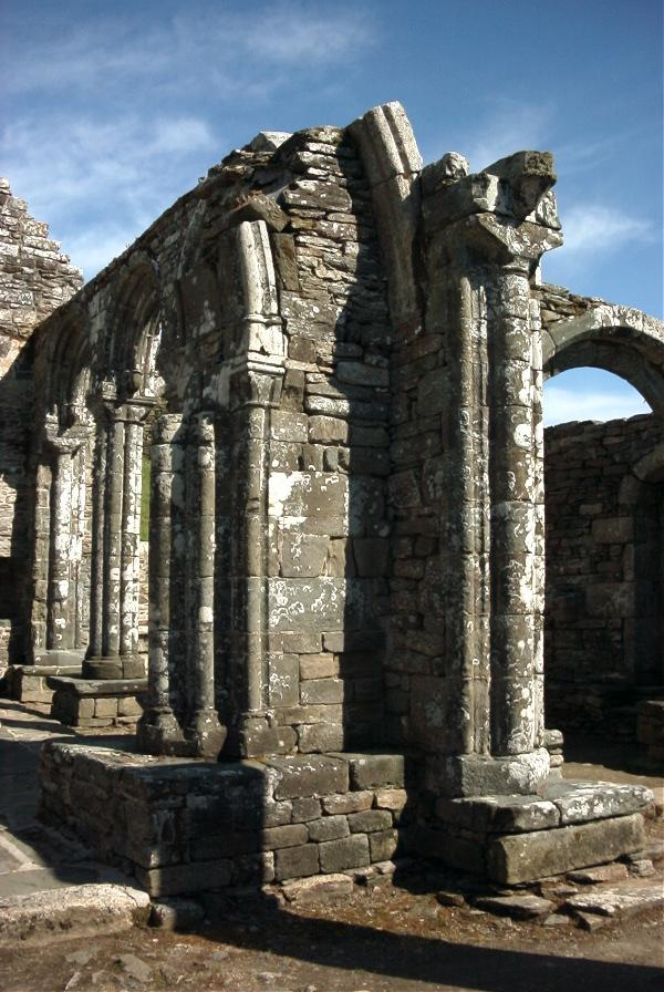 Chapelle de Languidou : pile sud de l'arc diaphragme